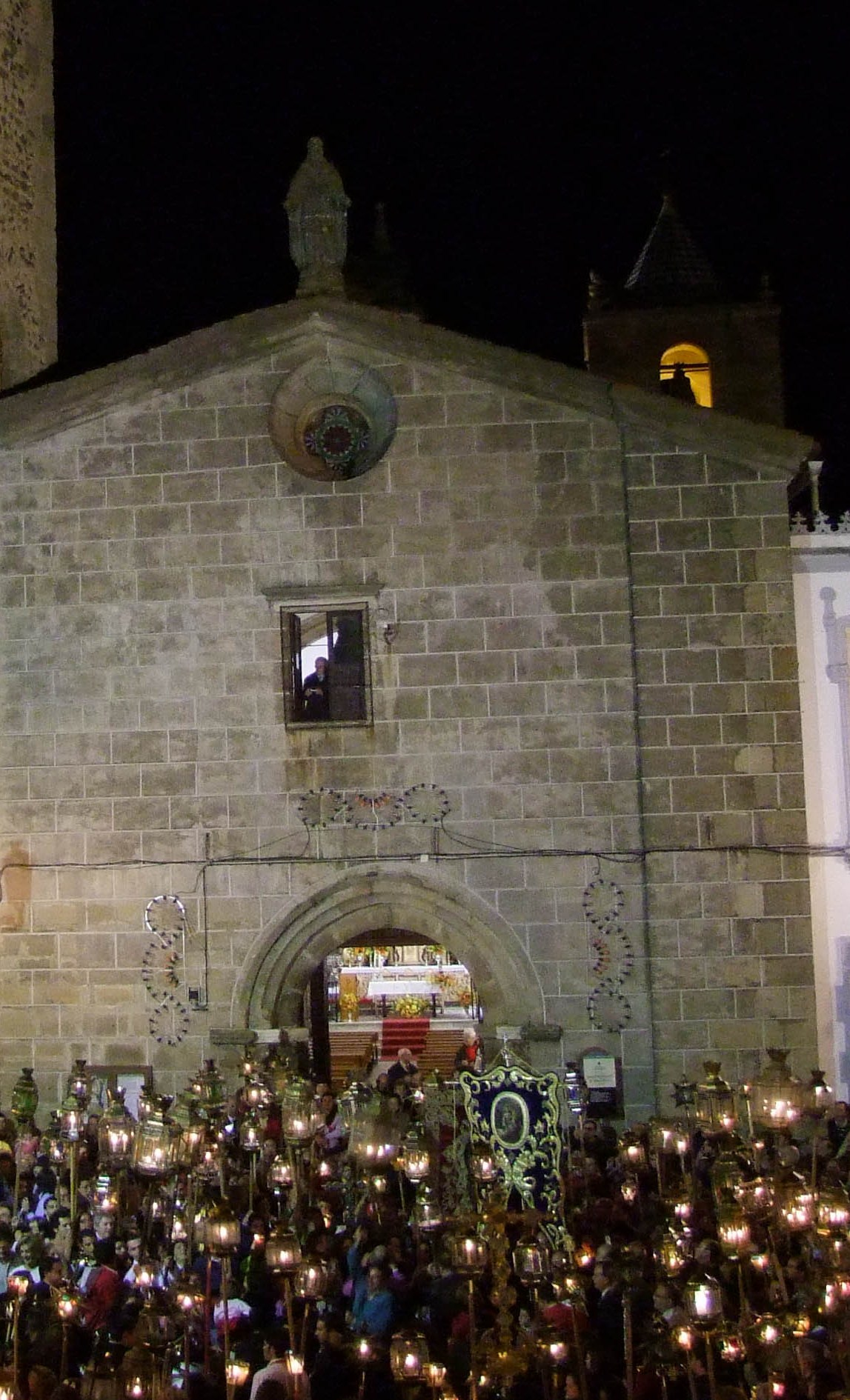 APOTEÓSIS DEL ROSARIO DEL DOMINGO DE MILAGROS